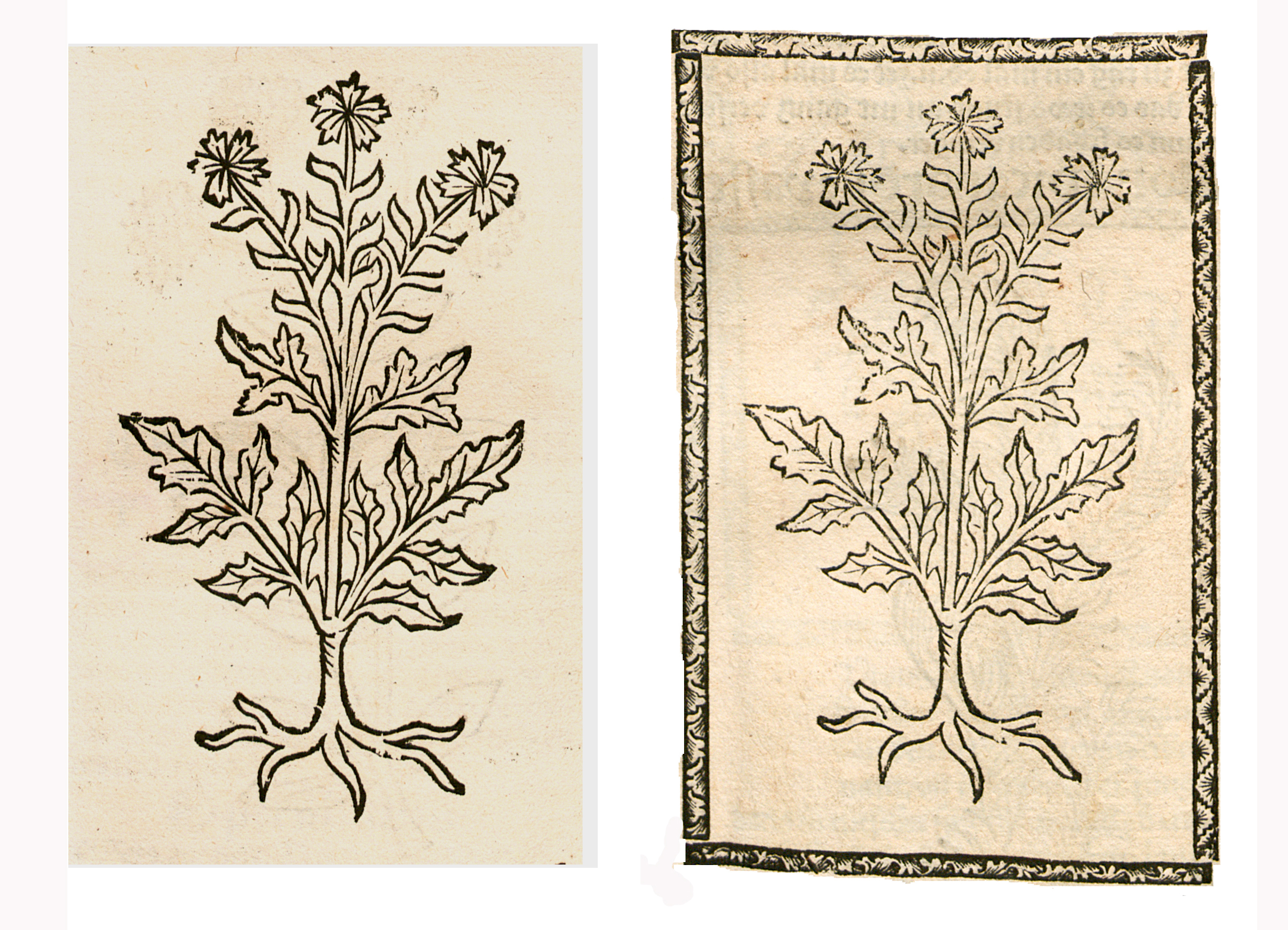 Abbildung vonː Senff Krut (Sinapis spec.)